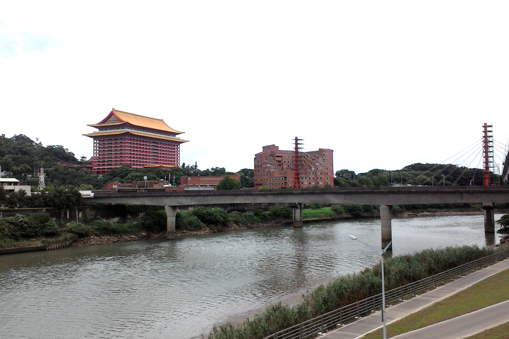 由承德橋向上游方向看基隆河,台北市大同區大龍次分區重慶里